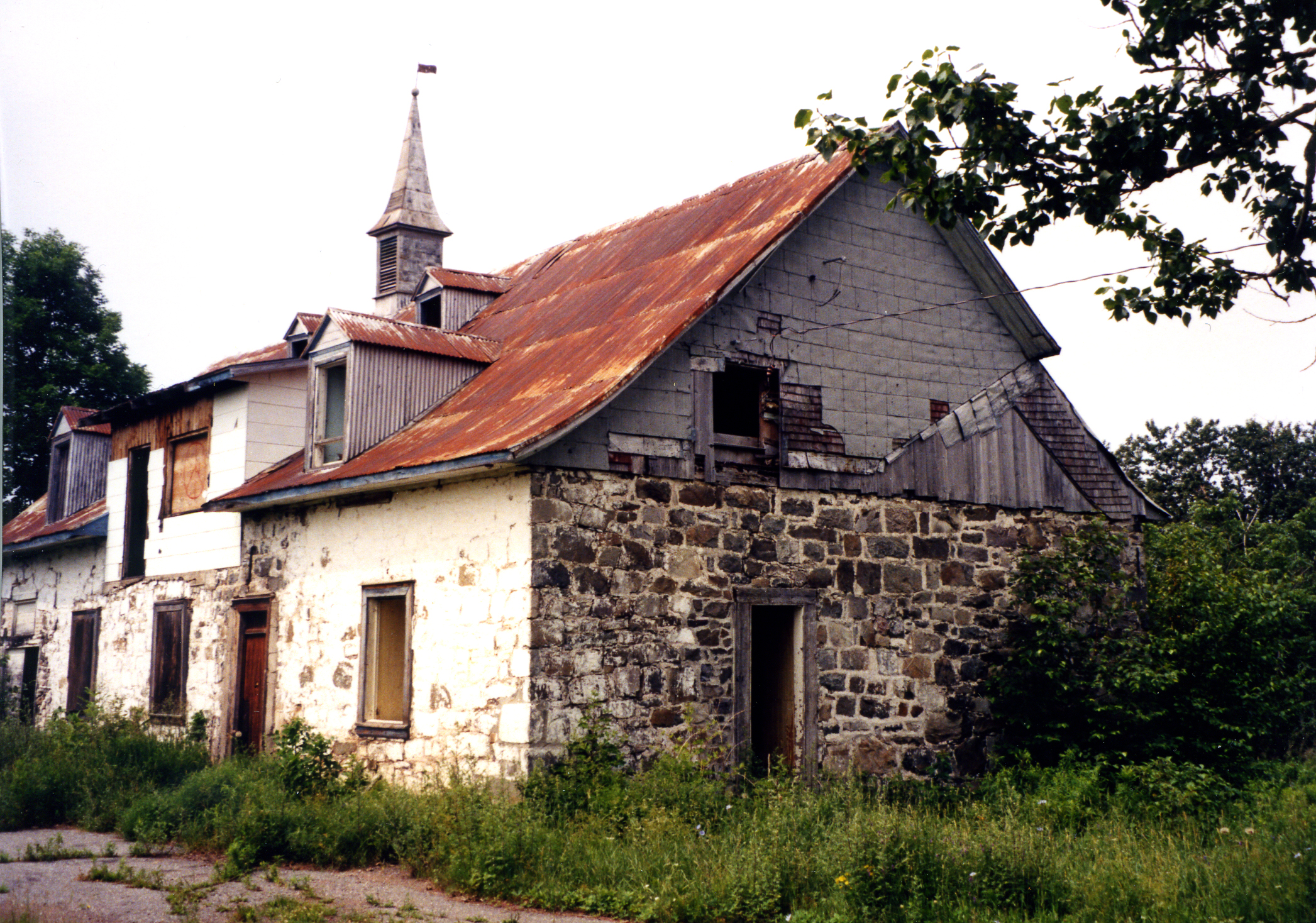 Moulin Ouellet, situé à Cap-Saint-Ignace (Chaudière-Appalaches, Québec), avant les premiers travaux de restauration. Moulin à eau; moulin à farine.